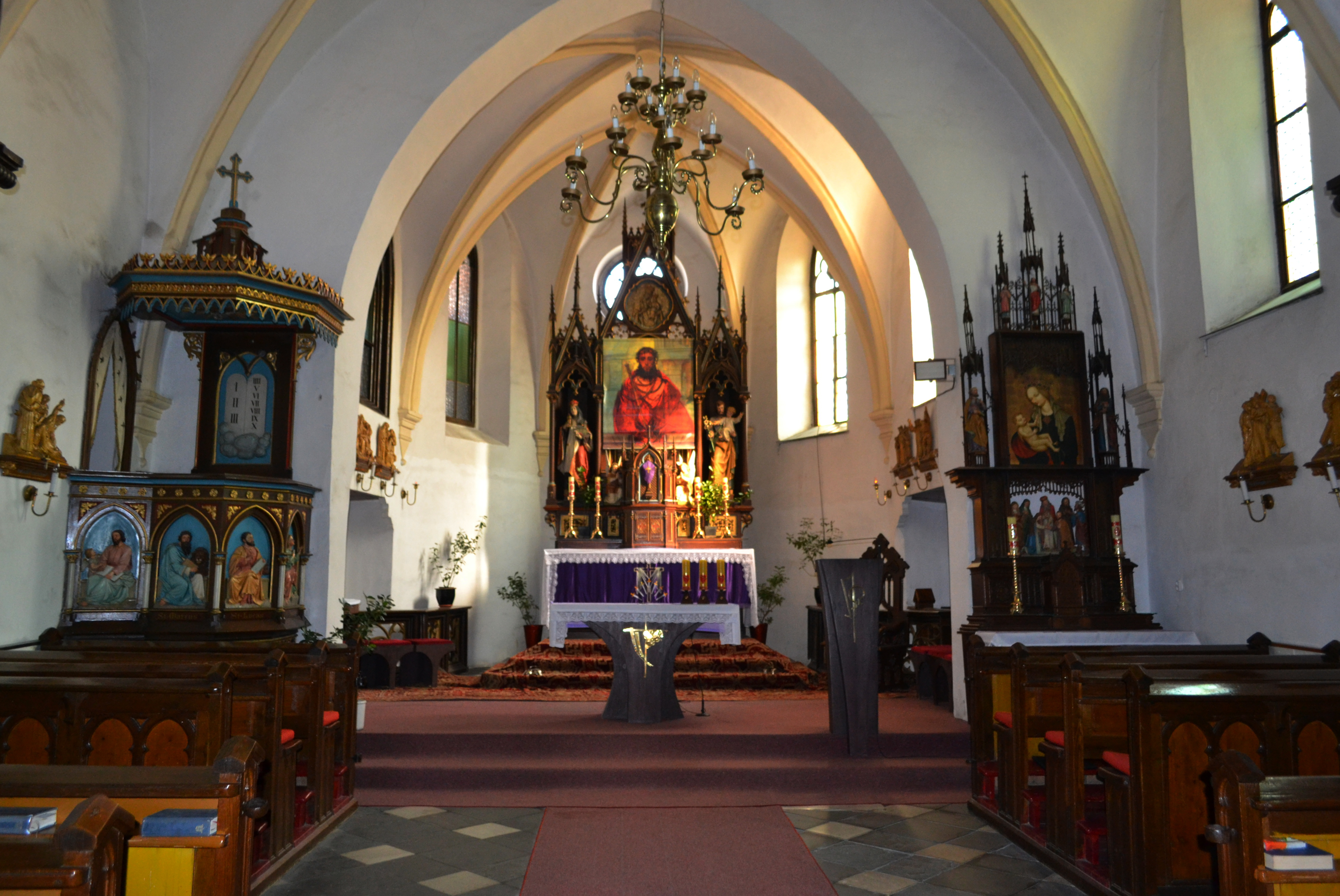 pohled do presbytáře v kostele Nejsvětější Trojice (Raduň, Moravskoslezský kraj, Česká republika)